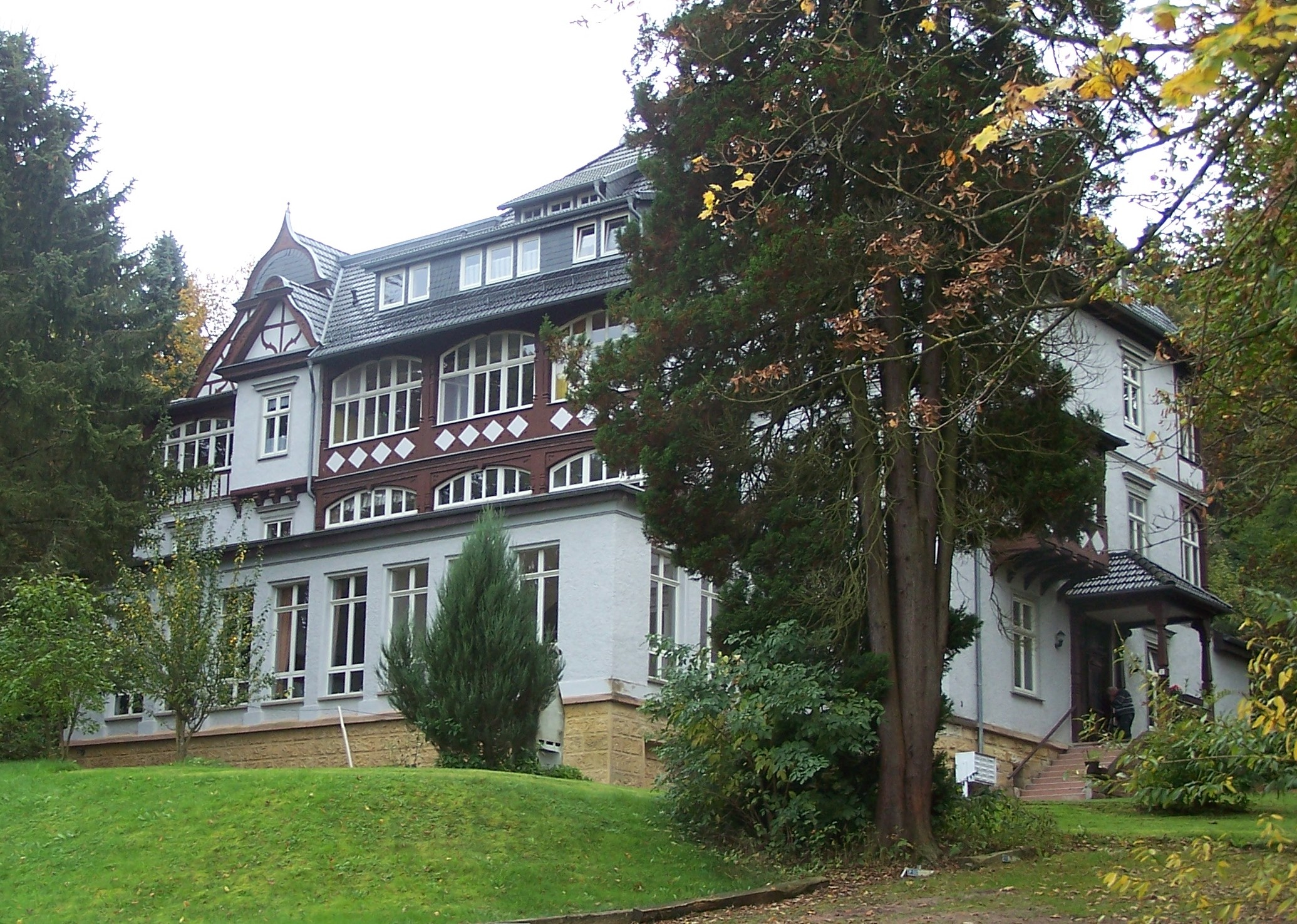 das ehemalige Erholungsheim für Telegrafenbeamtinnen "Else-Kolshorn-Haus", heute Sanatorium "Haus Thüringen" in Bad Liebenstein